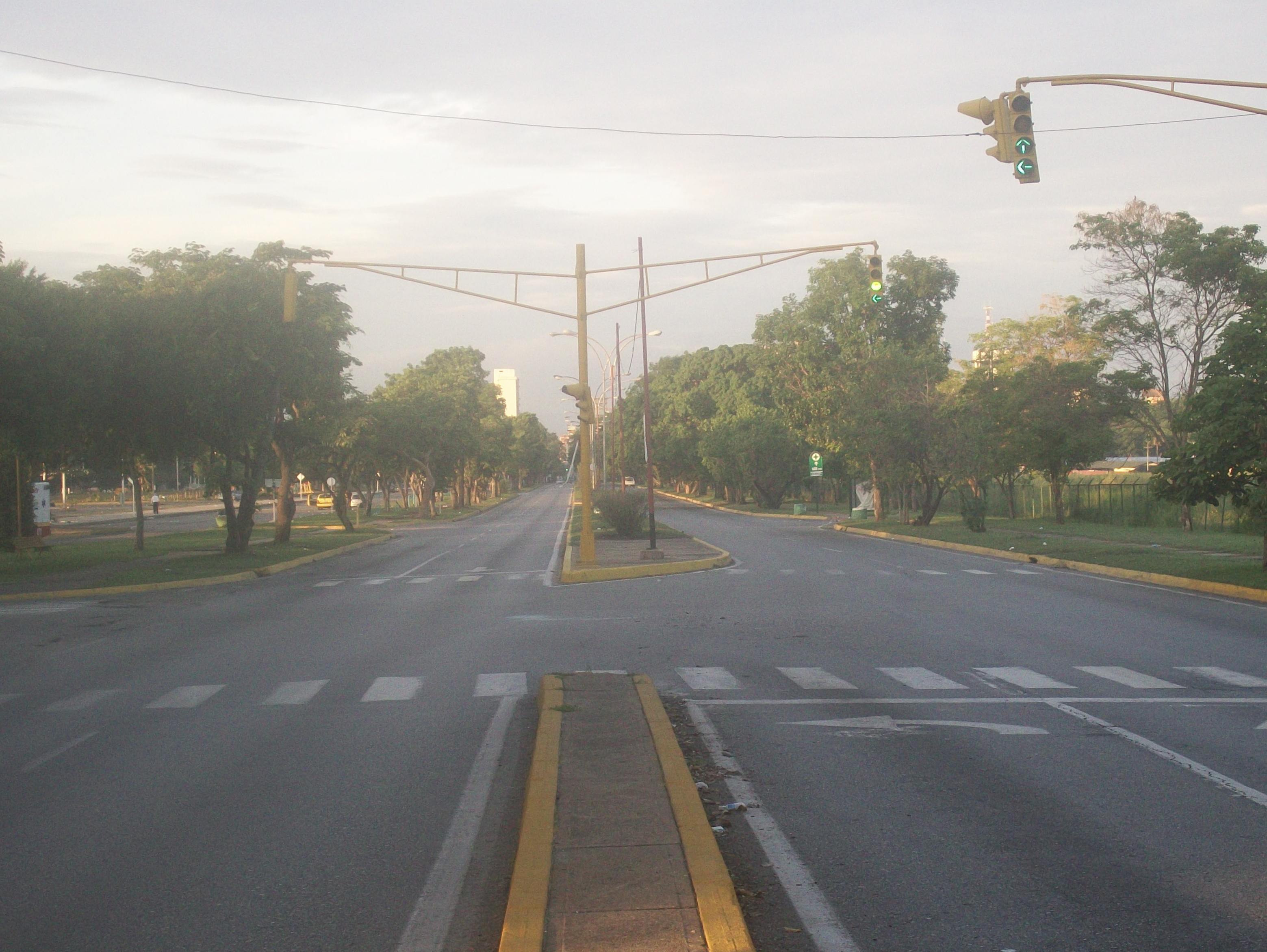 Avenida Las Ballenas, Maracay.